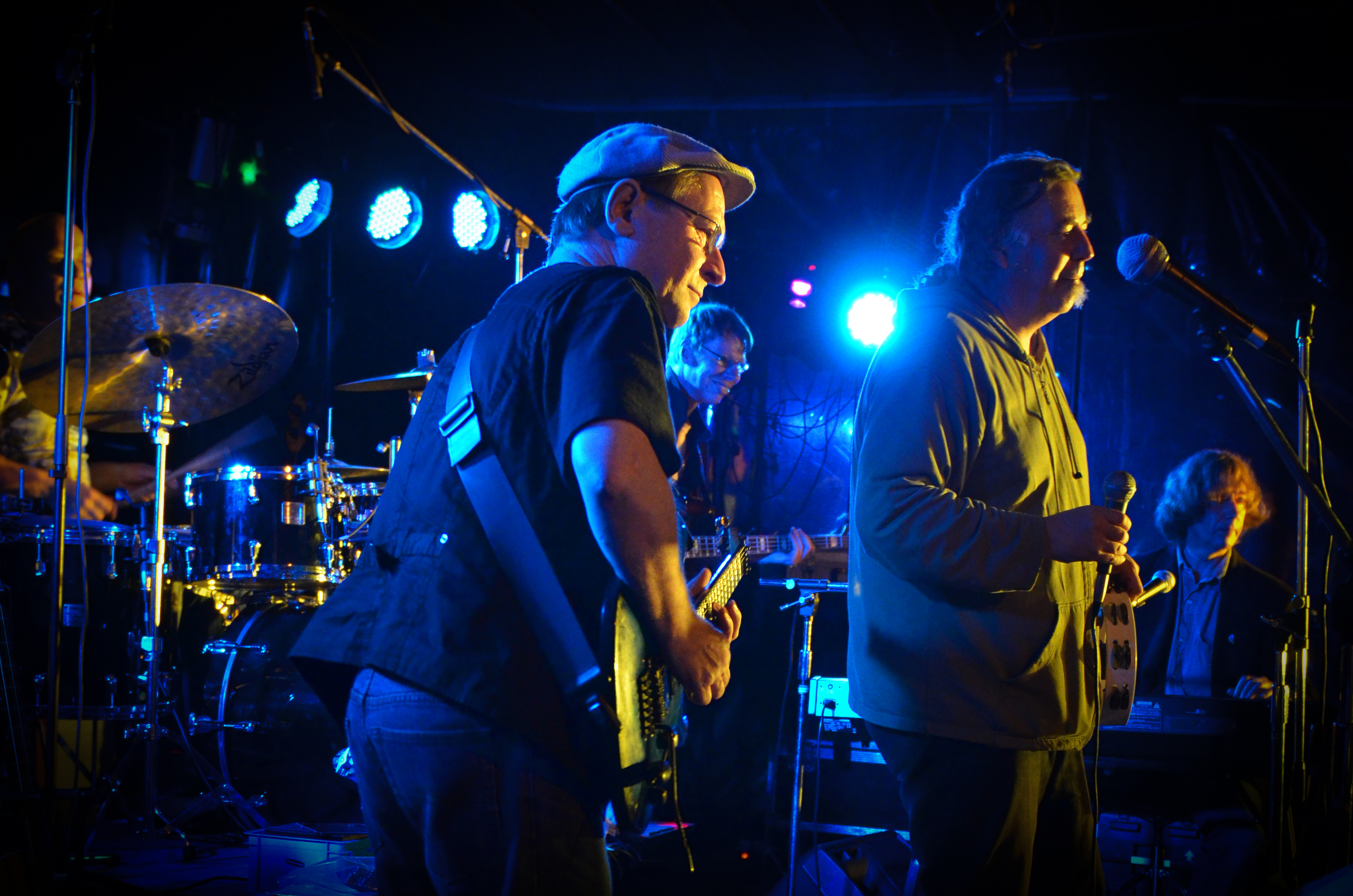 The Paul Botter's Soul & Blues Project live beim Walsroder Mittwoch 2011, Deutschland Paul Botter (vocals & guitar) • Steve P. Wieters (guitar & backing vocals) • Bernd "Scholly" Schultze (keyboards) • Martin Prill (bass) • Heinz Lichius (drums)